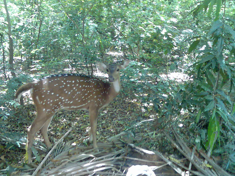 ഐ ഐ ടി മദ്രാസ് ക്യാമ്പസിൽ വളരുന്ന പുള്ളിമാൻ കൂട്ടത്തിലെ ഒരംഗം